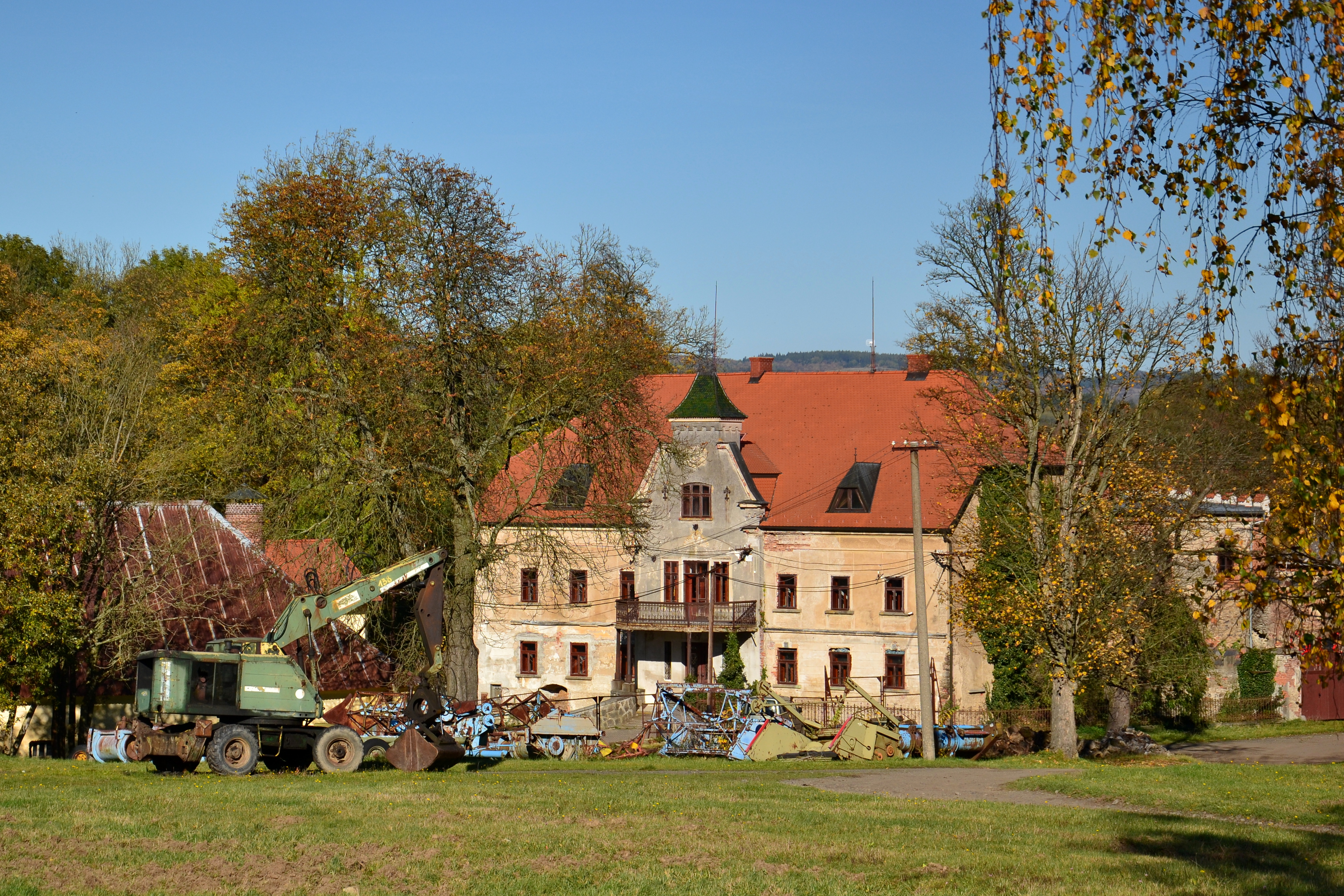 Údrč – průčelí zámku (pohled přes hospodářský areál z jihovýchodu)